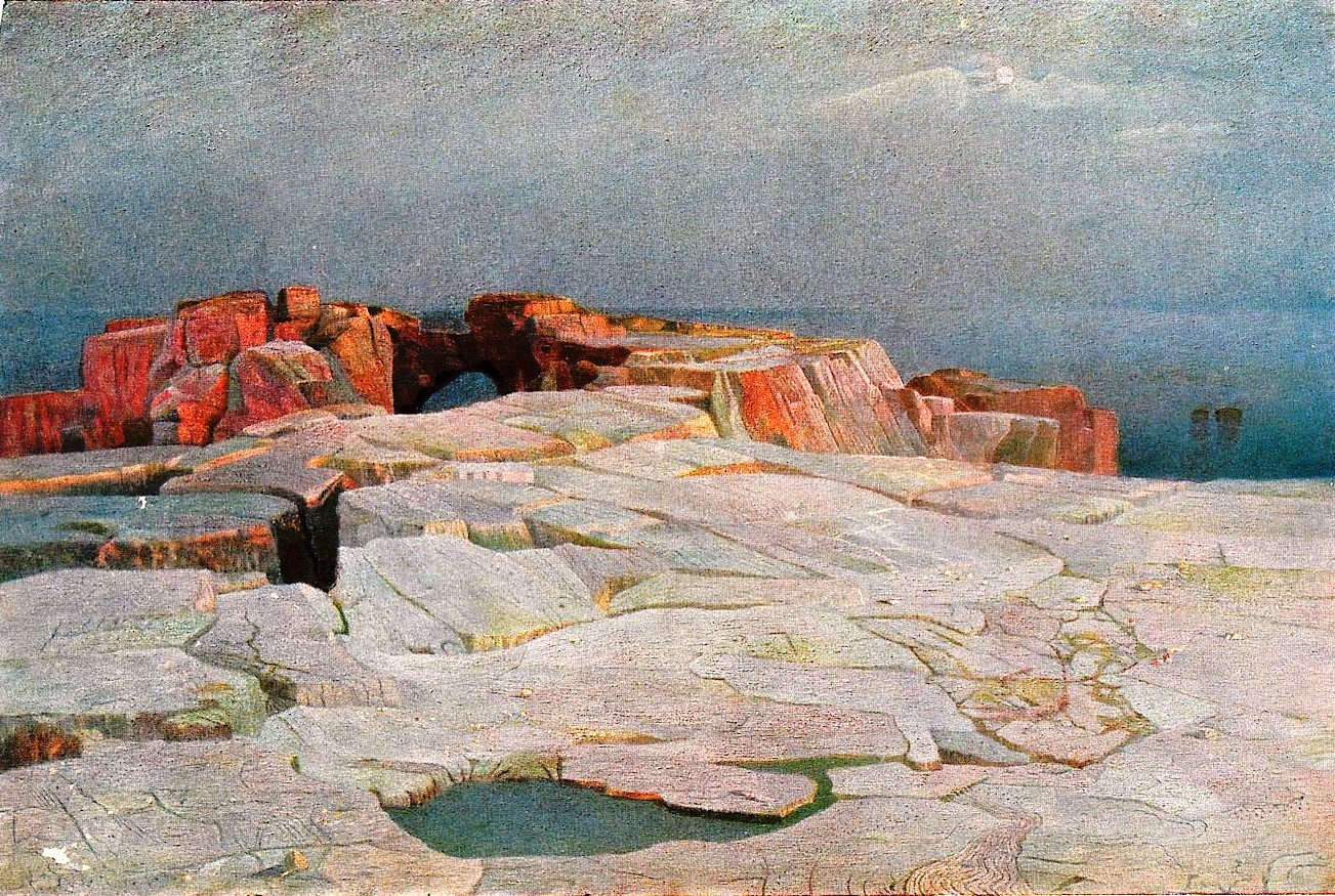 Karl Mediz ohne Titel (Küstenlandschaft)